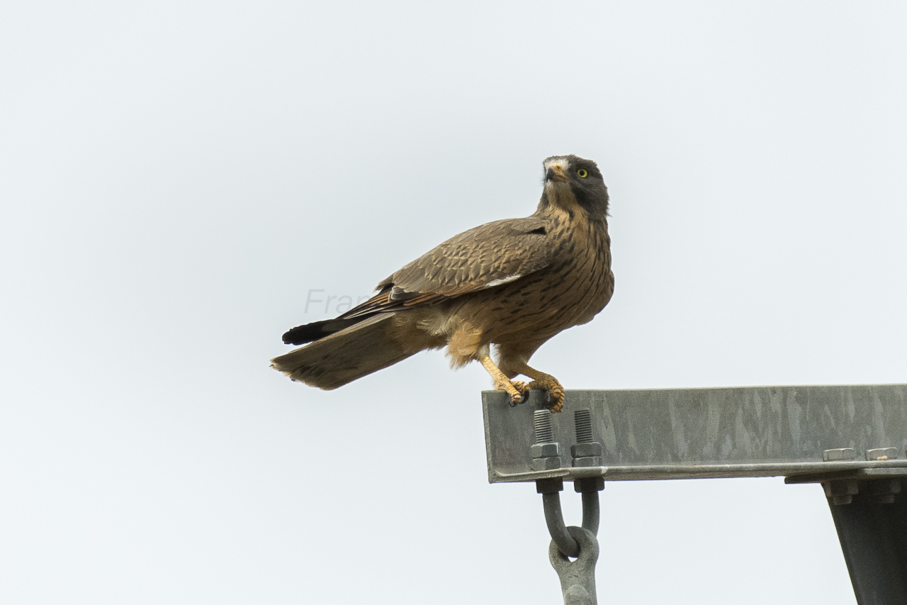 Grasshopper Buzzard - Gambia 17_CD5A9840